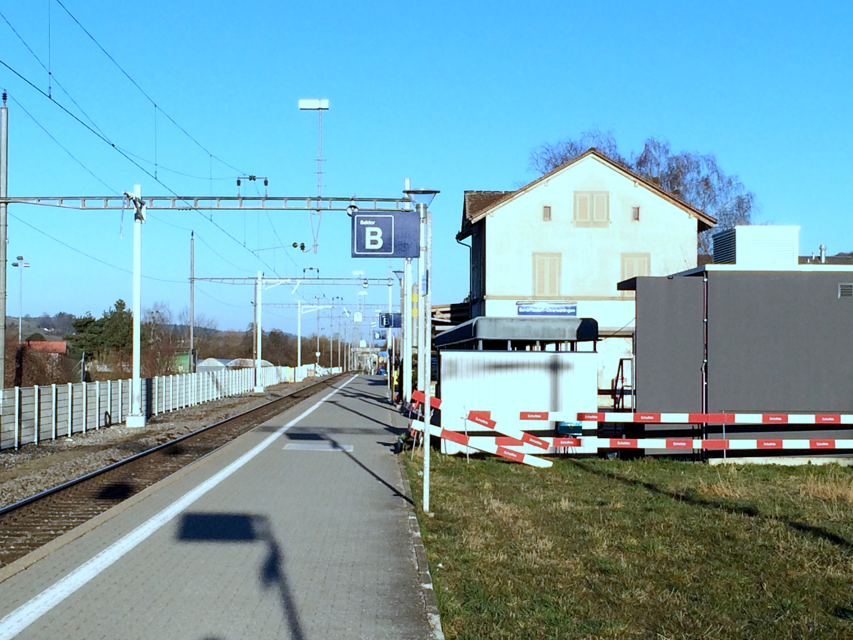 Bahnhof Schöfflisdorf-Oberweningen in der Morgensonne. Man beachte die vorbereiteten neuen Fahrleitungsmasten, welche die alten Fahrleitungsjoche aus dem Jahre 1960 ersetzen werden.